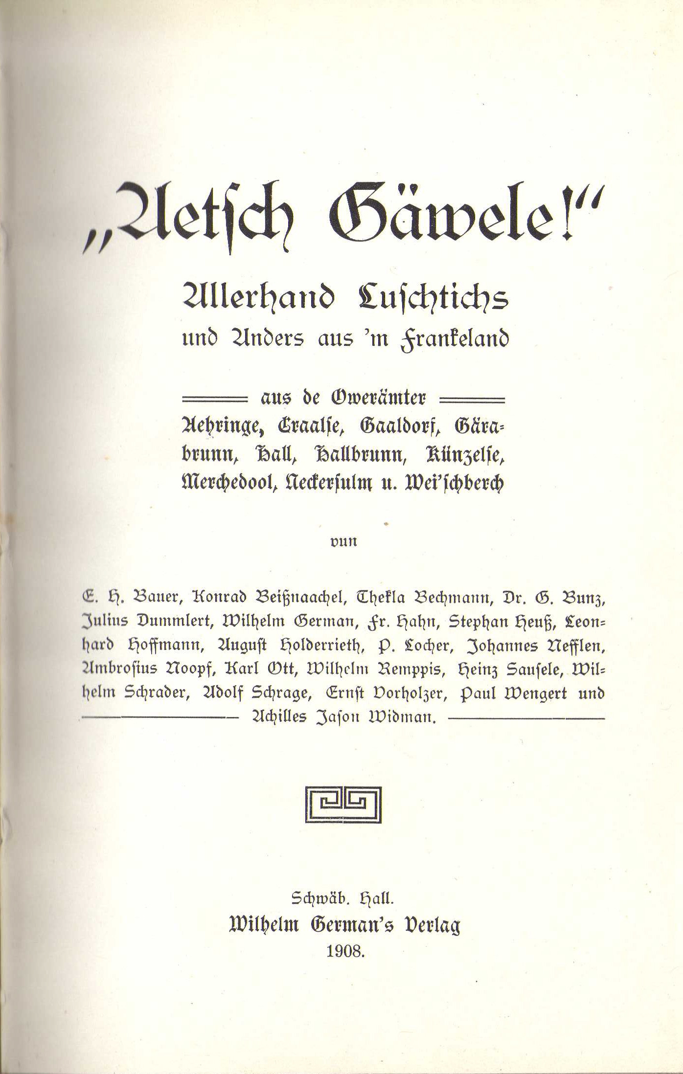 Titel: „Aetsch Gäwele!“ Allerhand Luschtichs und Anders aus ’m Frankeland. Schwäbisch Hall. Wilhelm German’s Verlag. 1908.